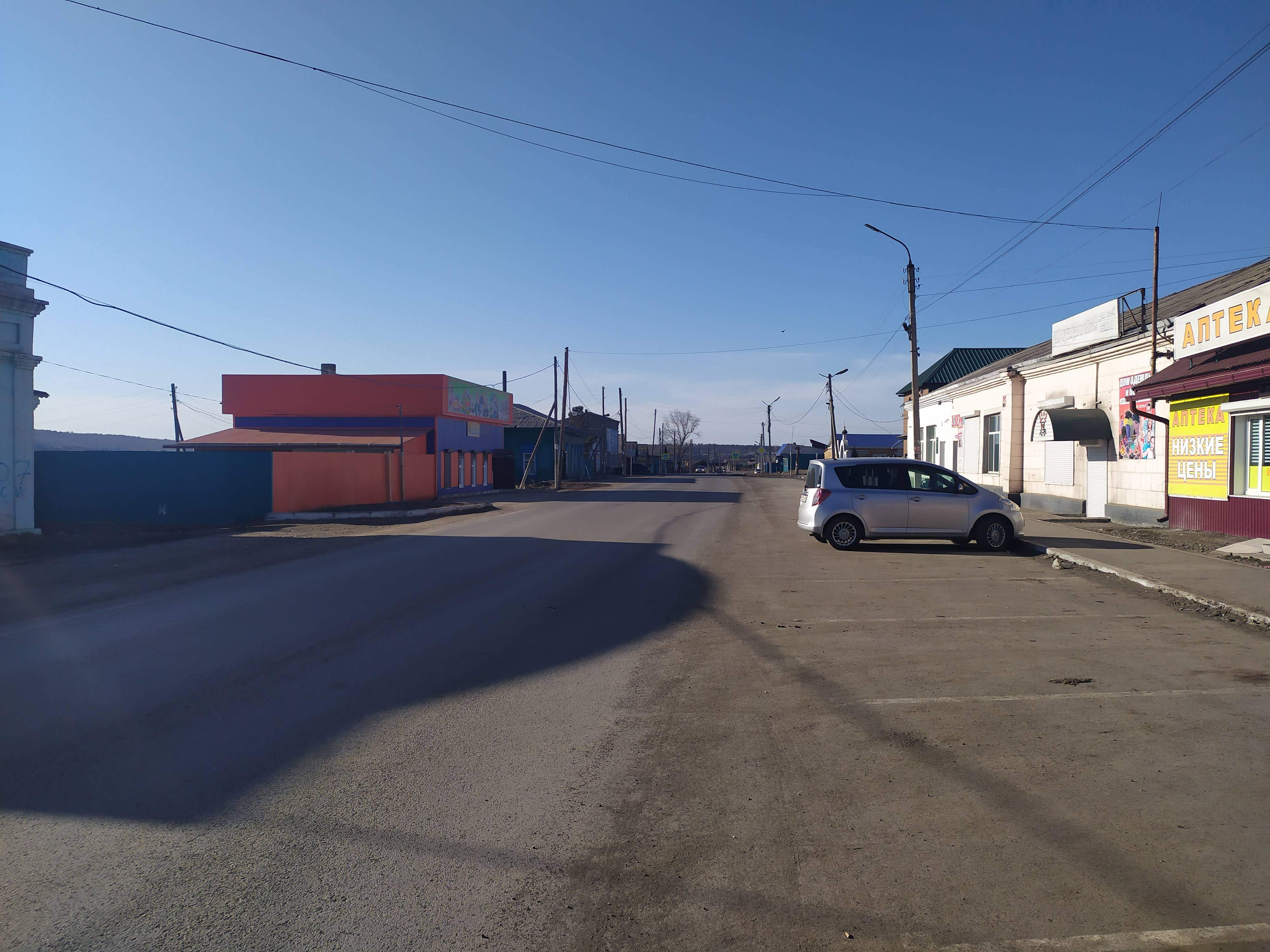 улица Советская.